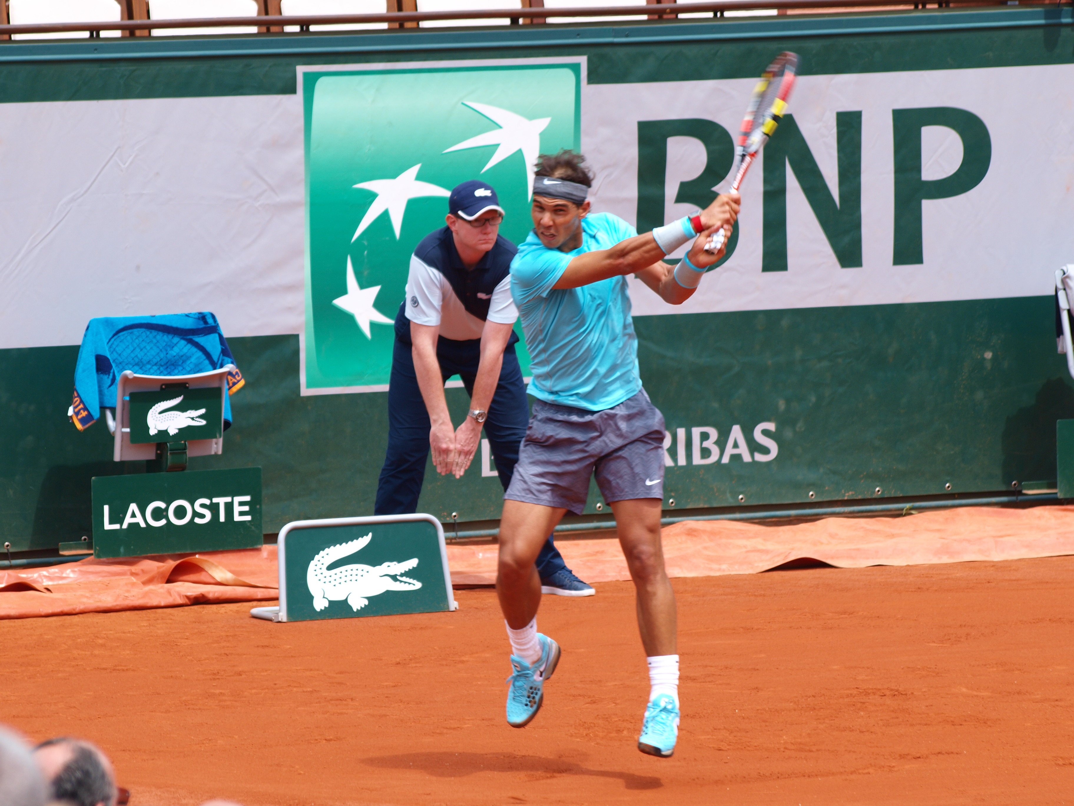 Internationaux de France de tennis, le 2 juin 2014, sur le court Philippe Chatrier : Raphaël Nadal